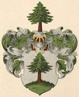 Gruenewaldti suguvõsa aadlivapp